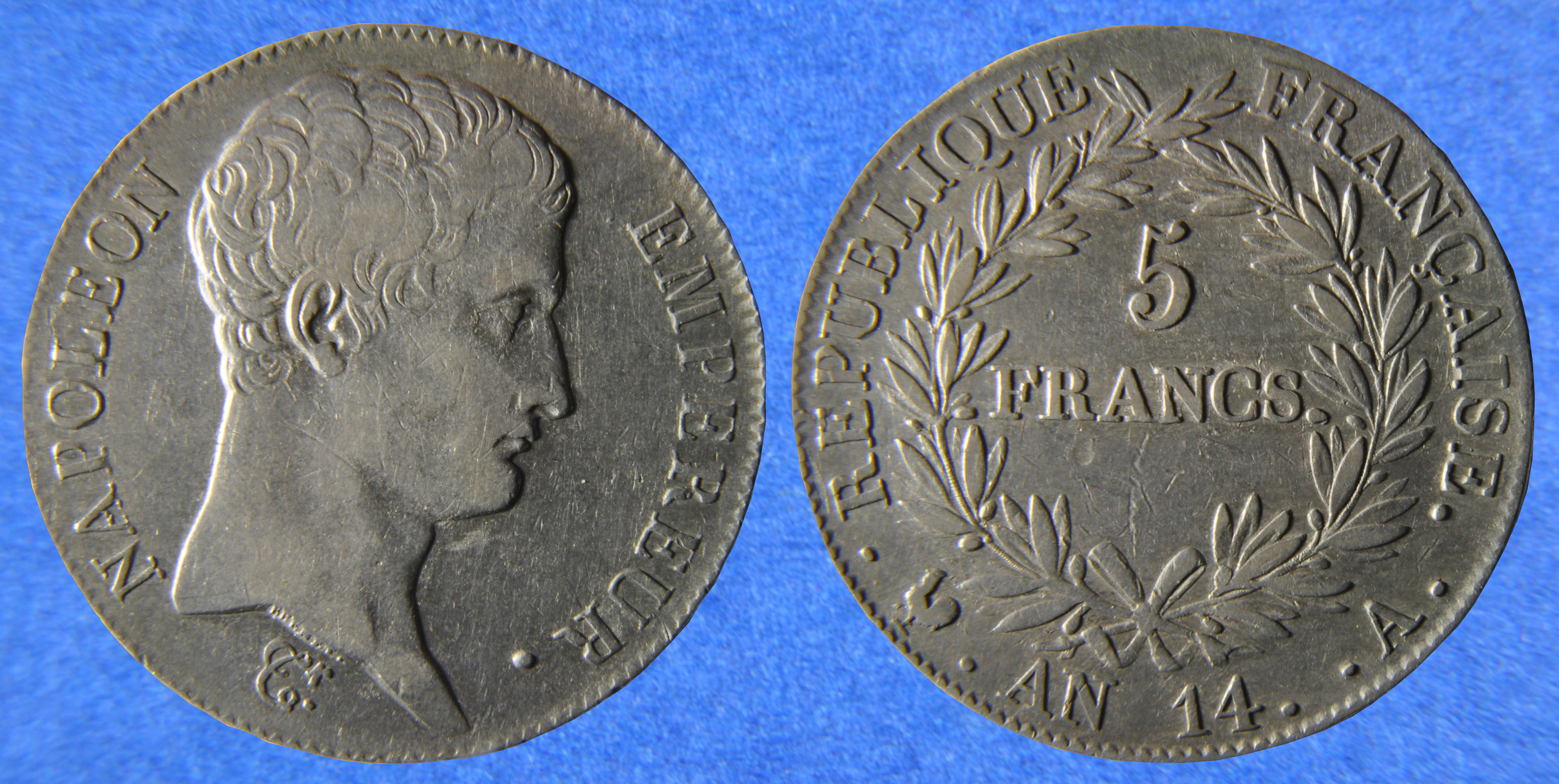 Monnaie de 5 francs en argent de l’Empire français (actuellement appelé Premier Empire) daté de l’An 14 c’est-à-dire 1805-1806.